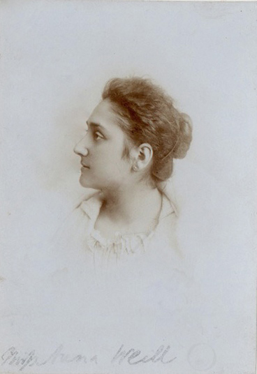 Portret van de in 1874 geboren harpiste Anna Weill